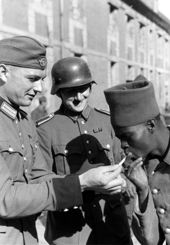 Freund und Feind 2 Wachtm. der Sch. [Schutztruppe?]